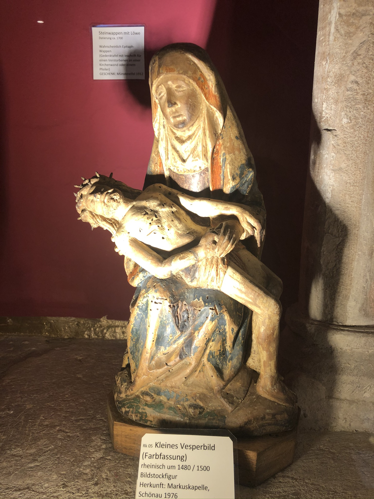 Pieta aus dem Romanischen Haus in Bad Münstereifel, Deutschland